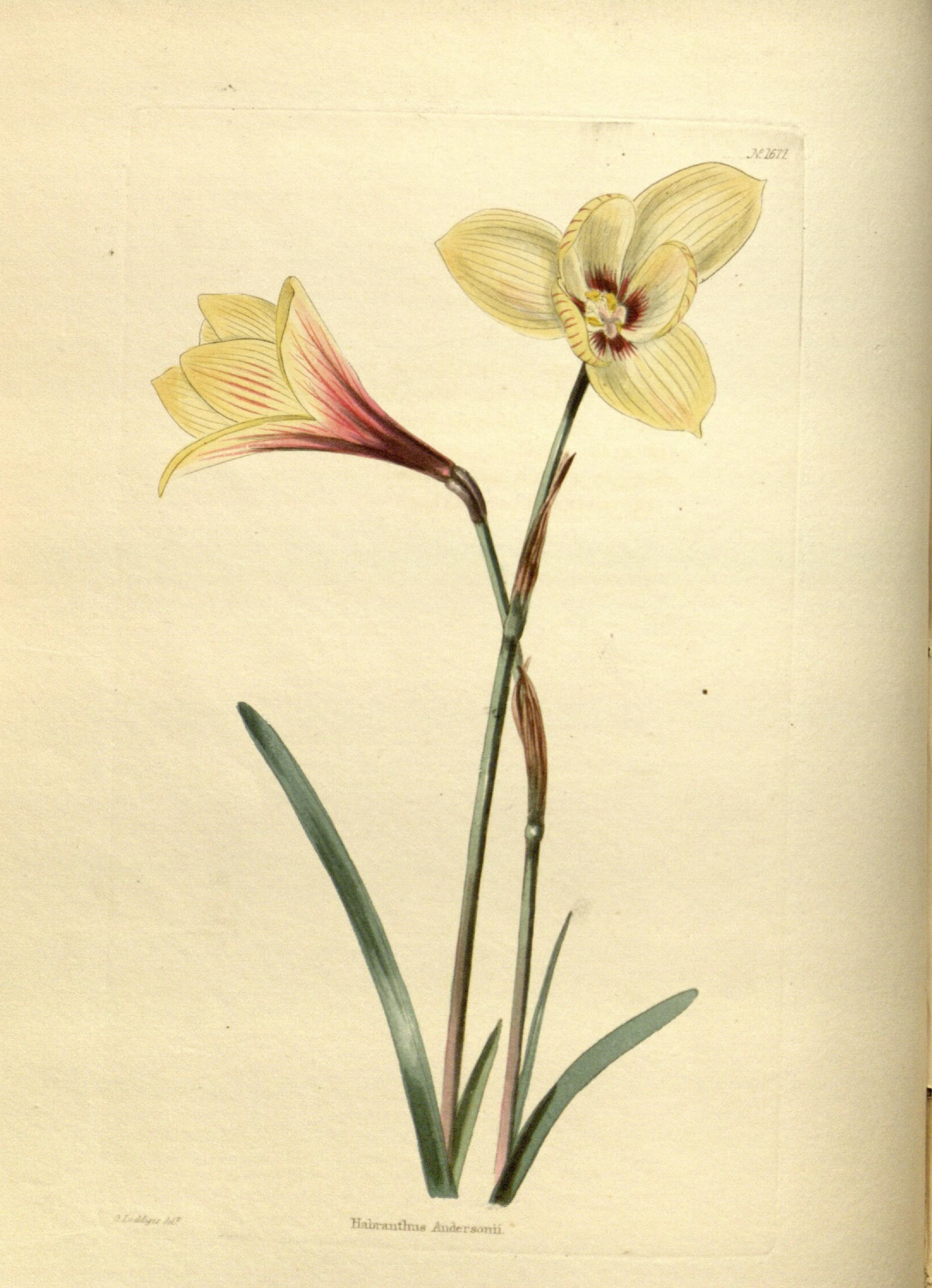 ^ 1- ^' A. m \t*iH ( I . -; An^ rj^